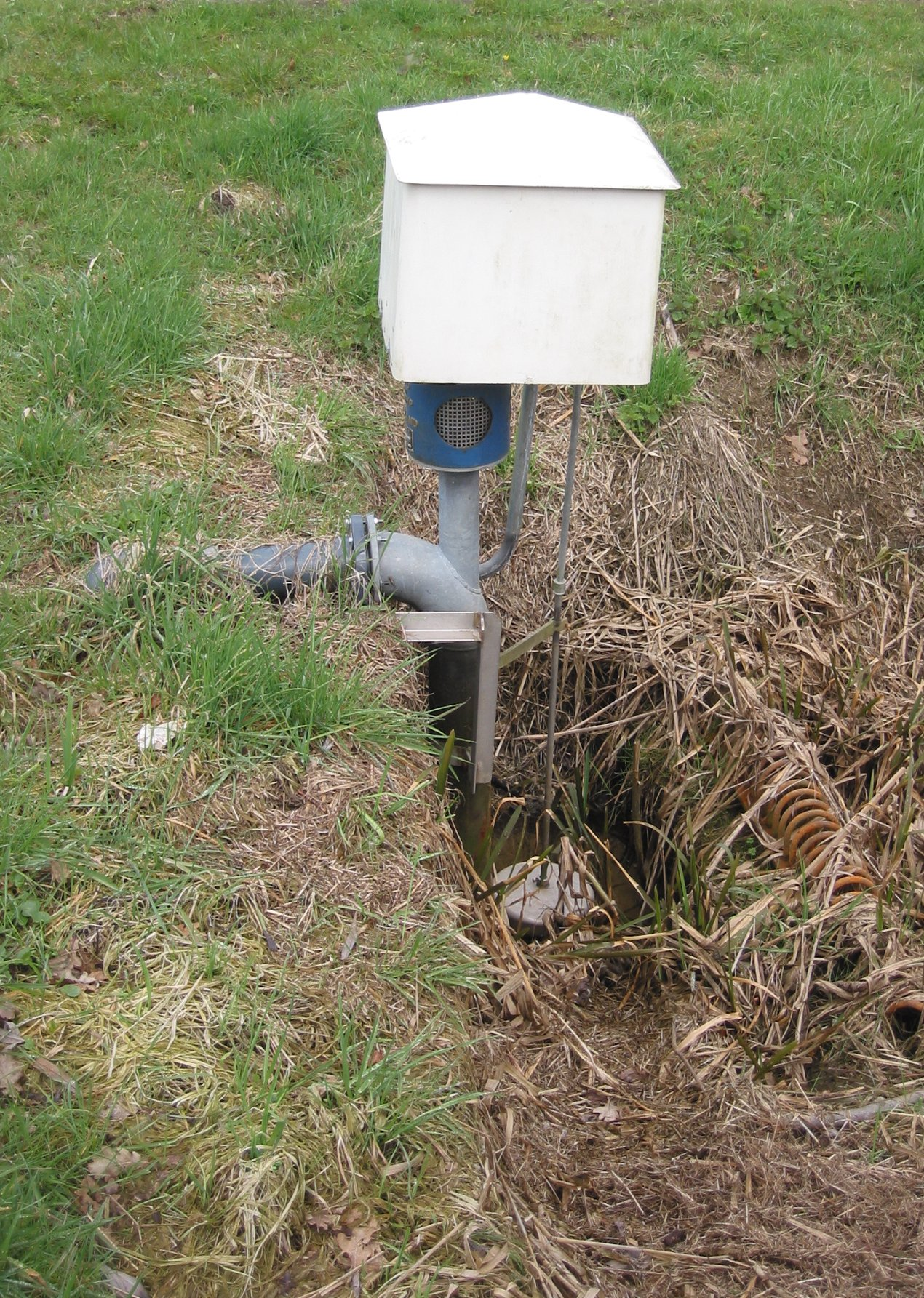 Onderbemalingspomp